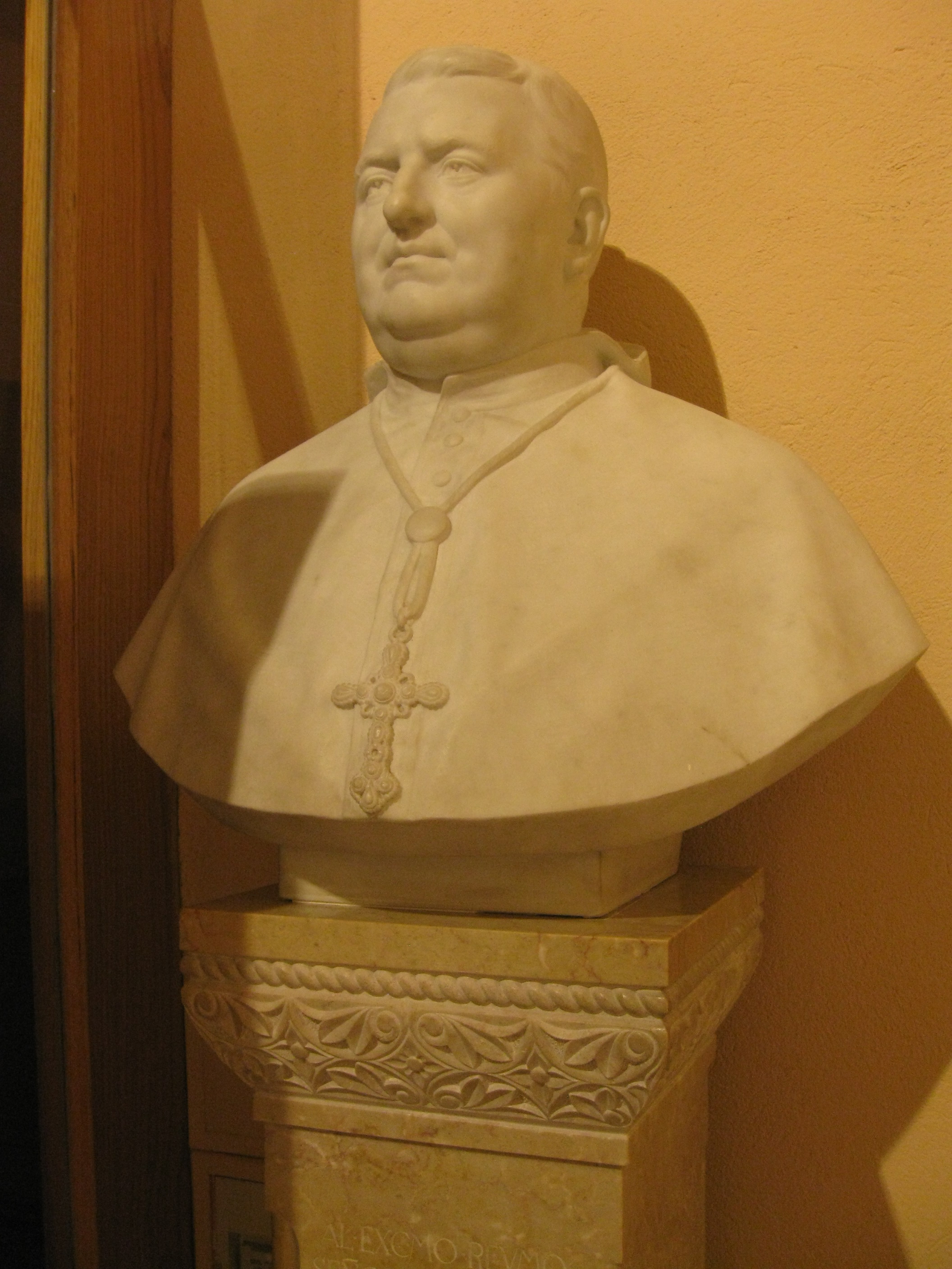 Catedral de Santa Maria (Tarragona)